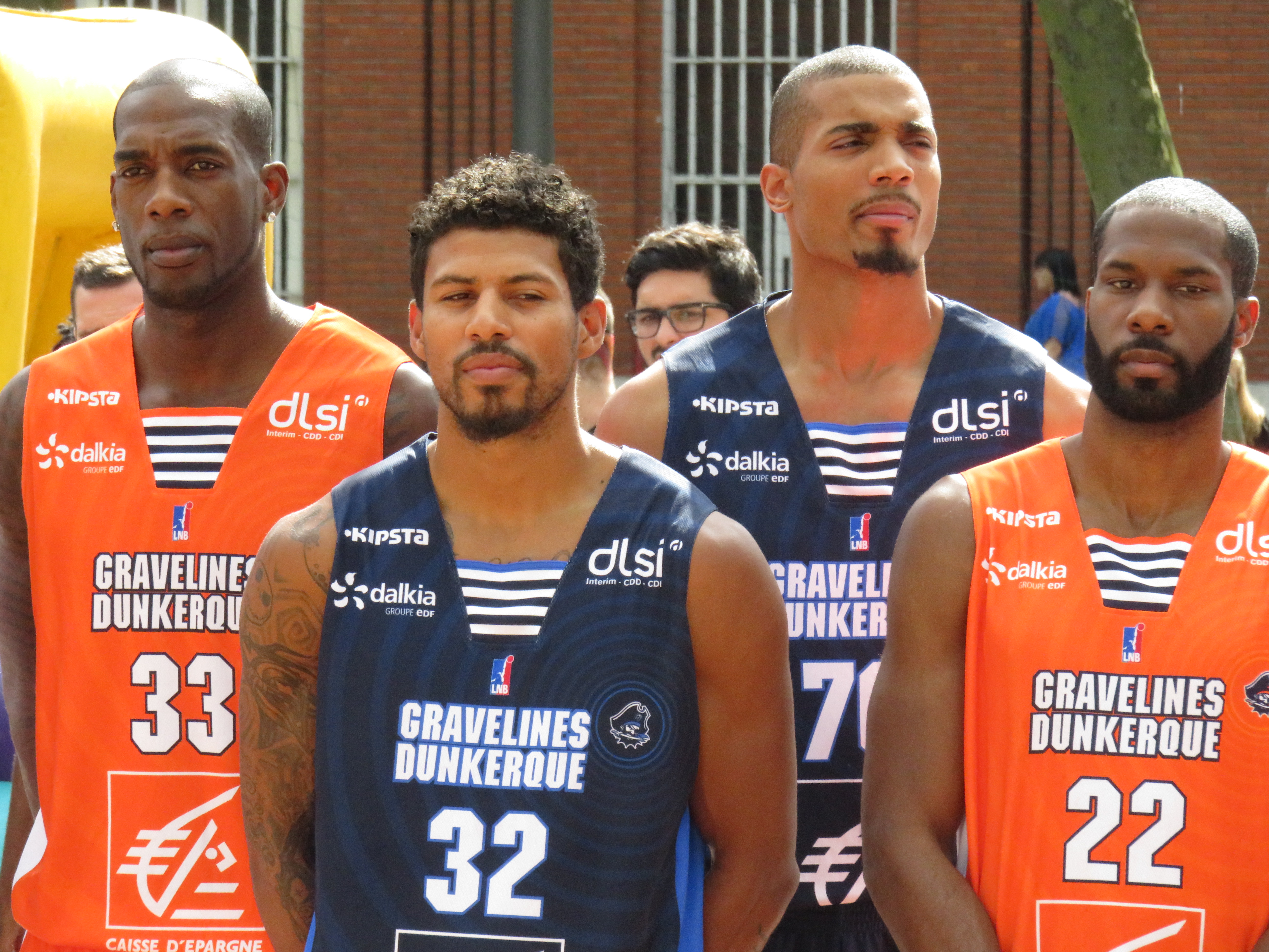 33 Shawn King 32 Steven Gray 70 Fernando Raposo 22 Kyle Gibson